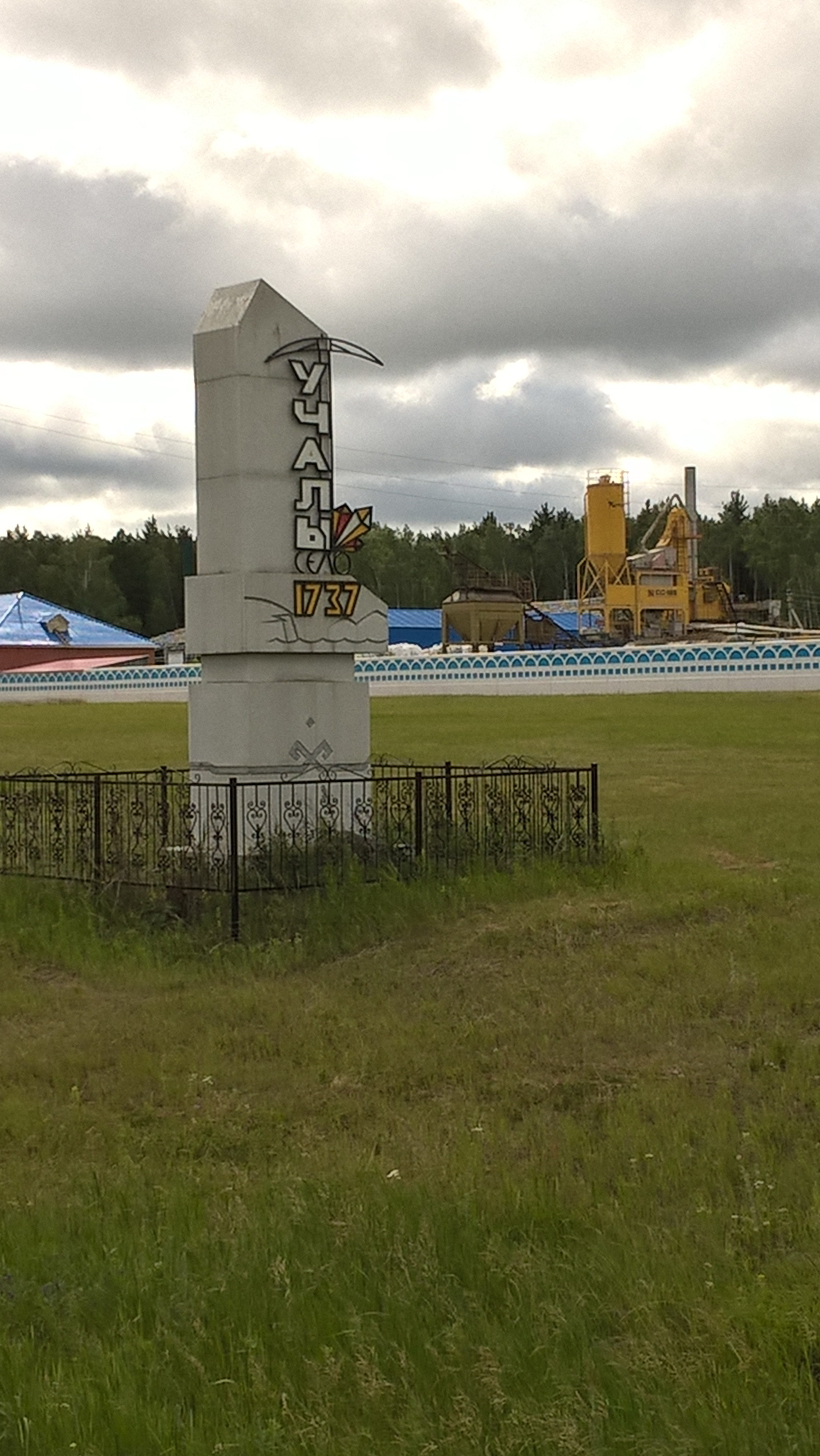 г.Учалы